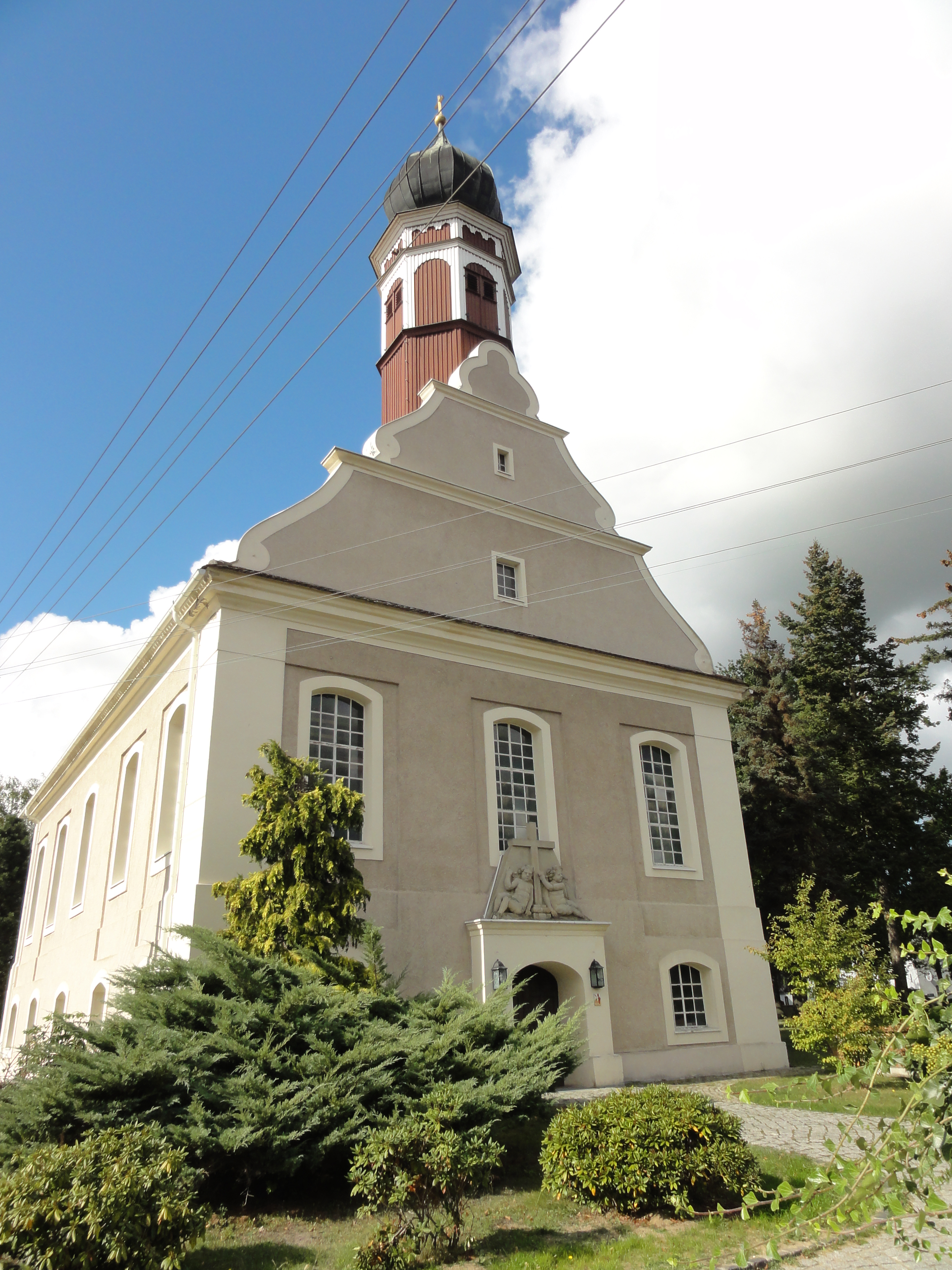 Kirche in Reichwalde; Kulturdenkmal Nr. 09277051